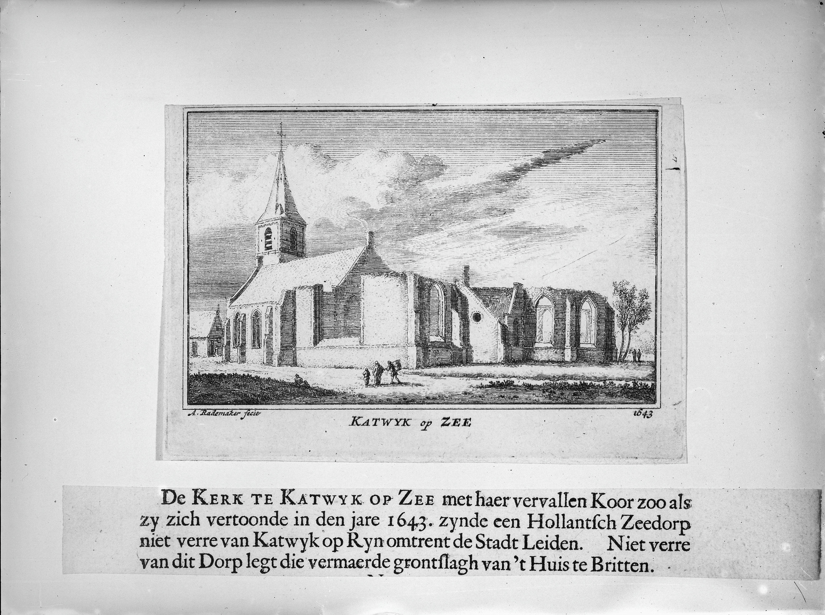 N.H.Kerk: naar prentje door A.Rademaker in het Gemeente Archief